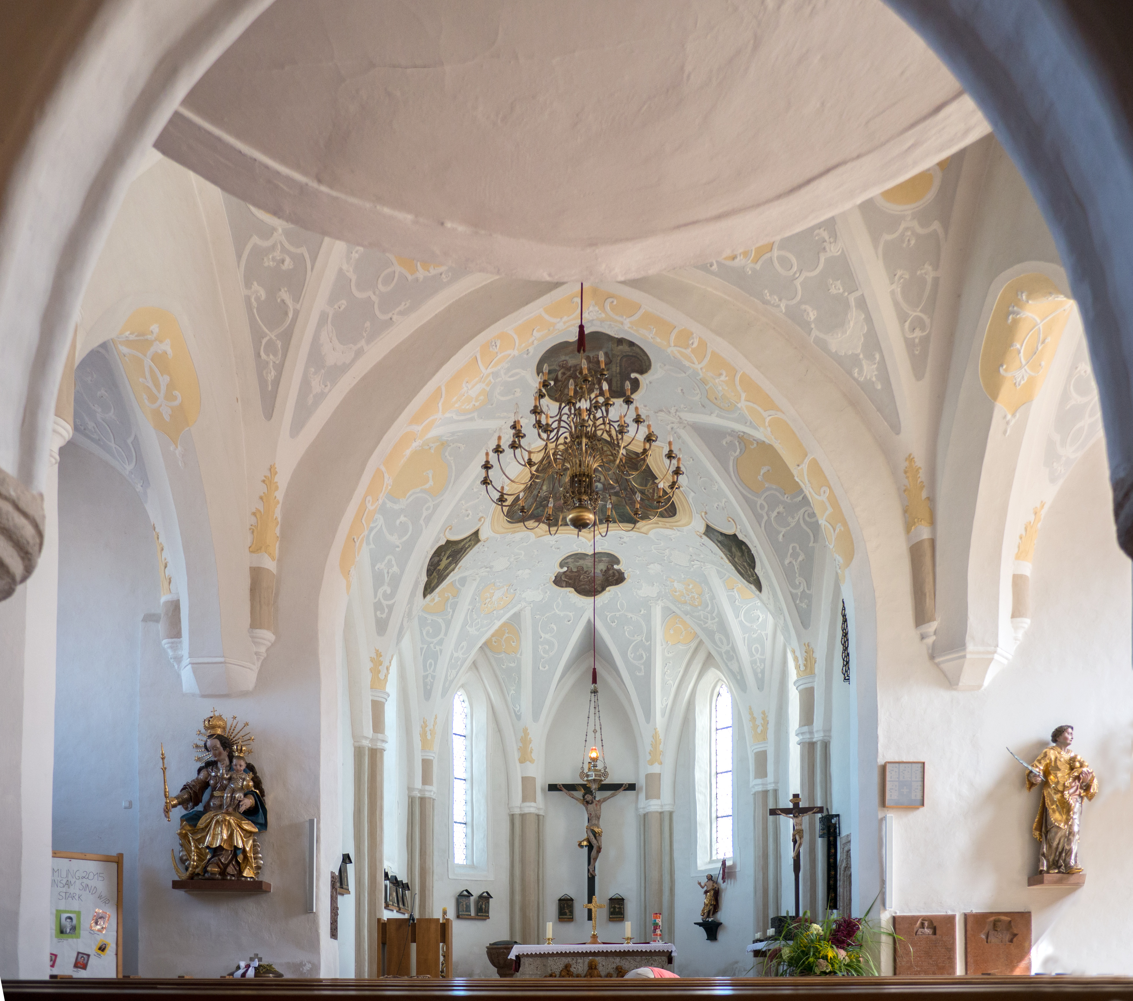 Kath. Pfarrkirche hl. Jakob der Ältere und Friedhof